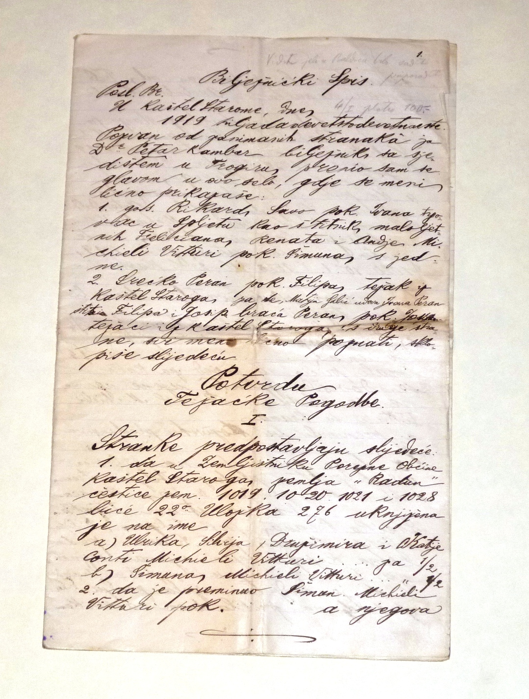 Težačka pogobda između Filipa Perana i obitelji Vitturi iz 1919. god.